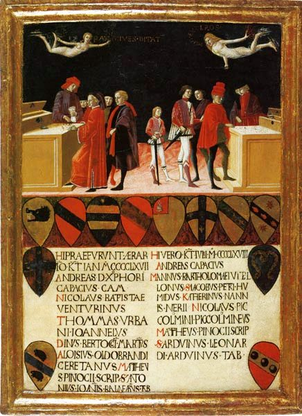 Benvenuto di Giovanni, Le Finanze del Comune in Tempo di Pace e in Tempo di Guerra. Siena, archivio di Stato, Museo delle tavolette di Biccherna.